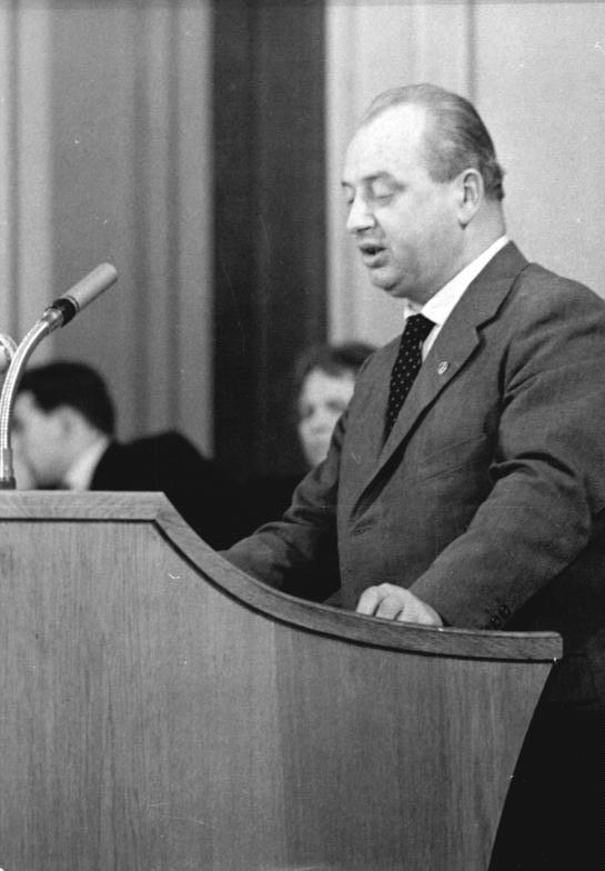 Zentralbild/24.3.1961 16. Sitzung der Volkskammer - Volkswirtschaftsplan und Staatshaushaltsplan 1961 - Hauptpunkte der Tagesordnung Die Volkskammer der Deutschen Demokratischen Republik trat am 24.3.1961 zu ihrer 16. Sitzung zusammen. UBz.: Es spricht der Abgeordnete Herbert Hoffmann von der Fraktion der DBD.